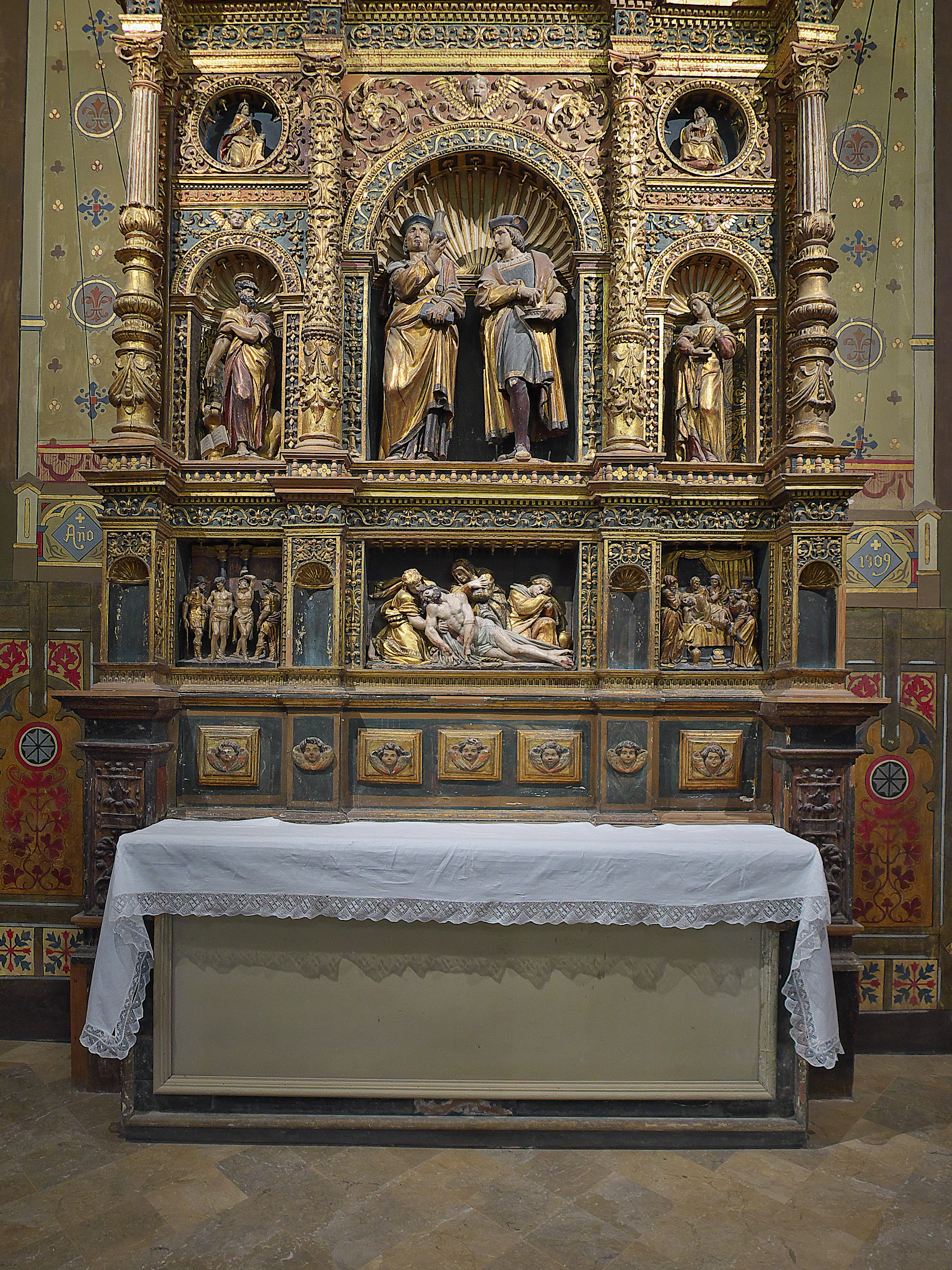 Iglesia de San Pedro, Teruel. Gabriel Yoly termina un retablo para los santos Cosme y Damián (1537).